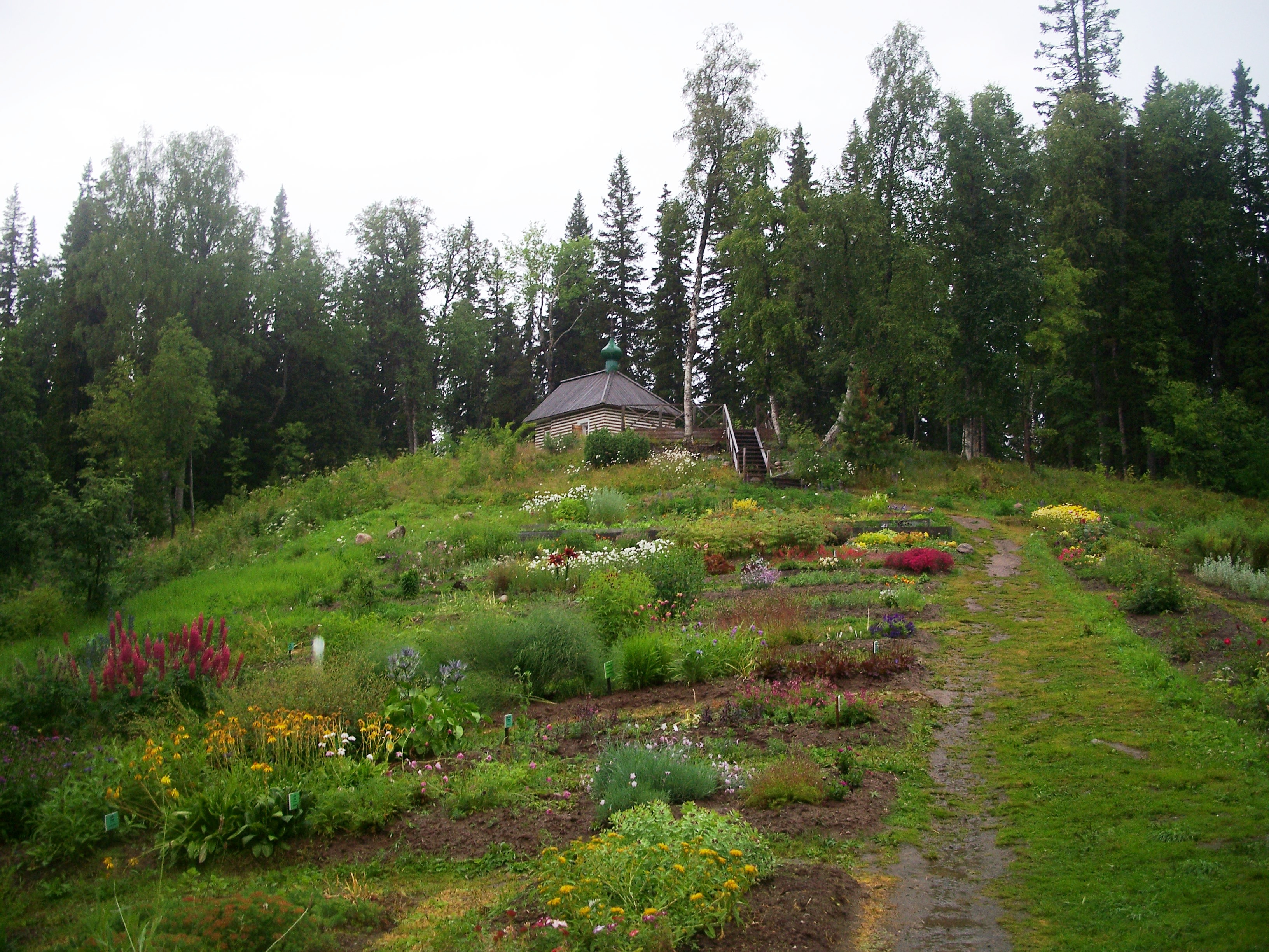 Пустынь Макарьевская (Хутор Горка) (Республика Карелия, Беломорск, остров Большой Соловецкий, северо-западная часть, 4 км от поселка)